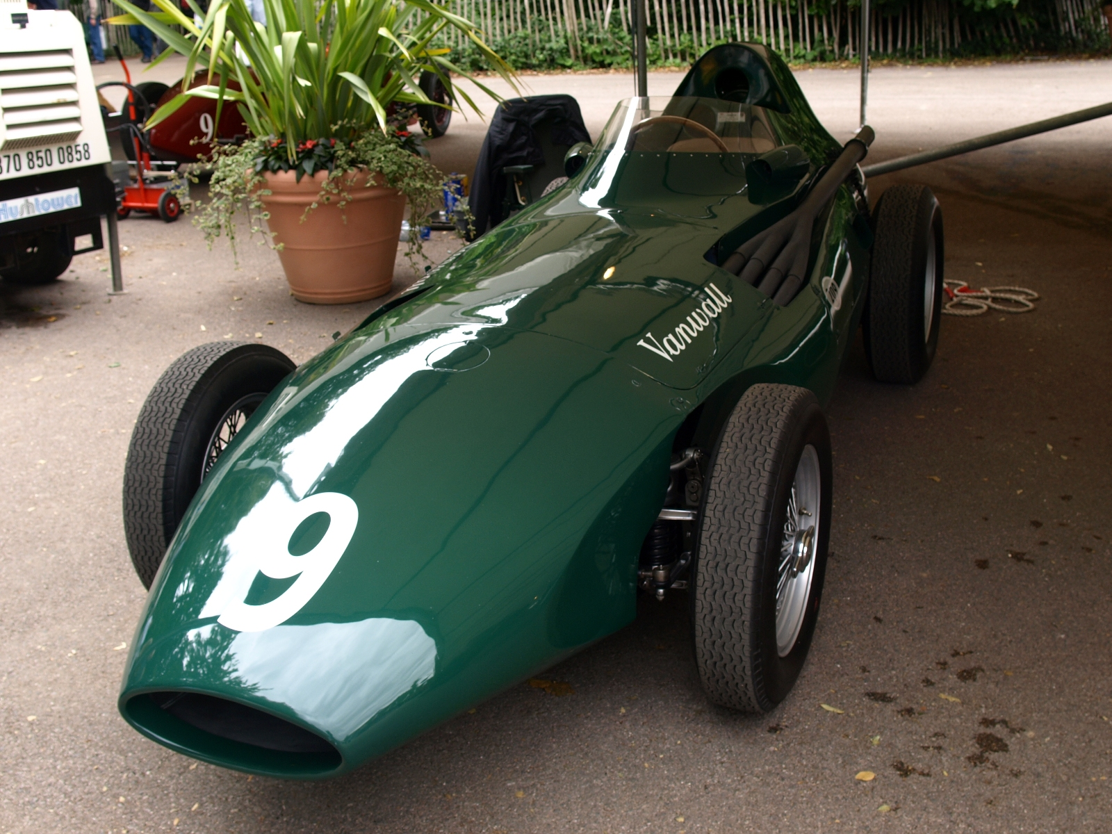 Vanwall